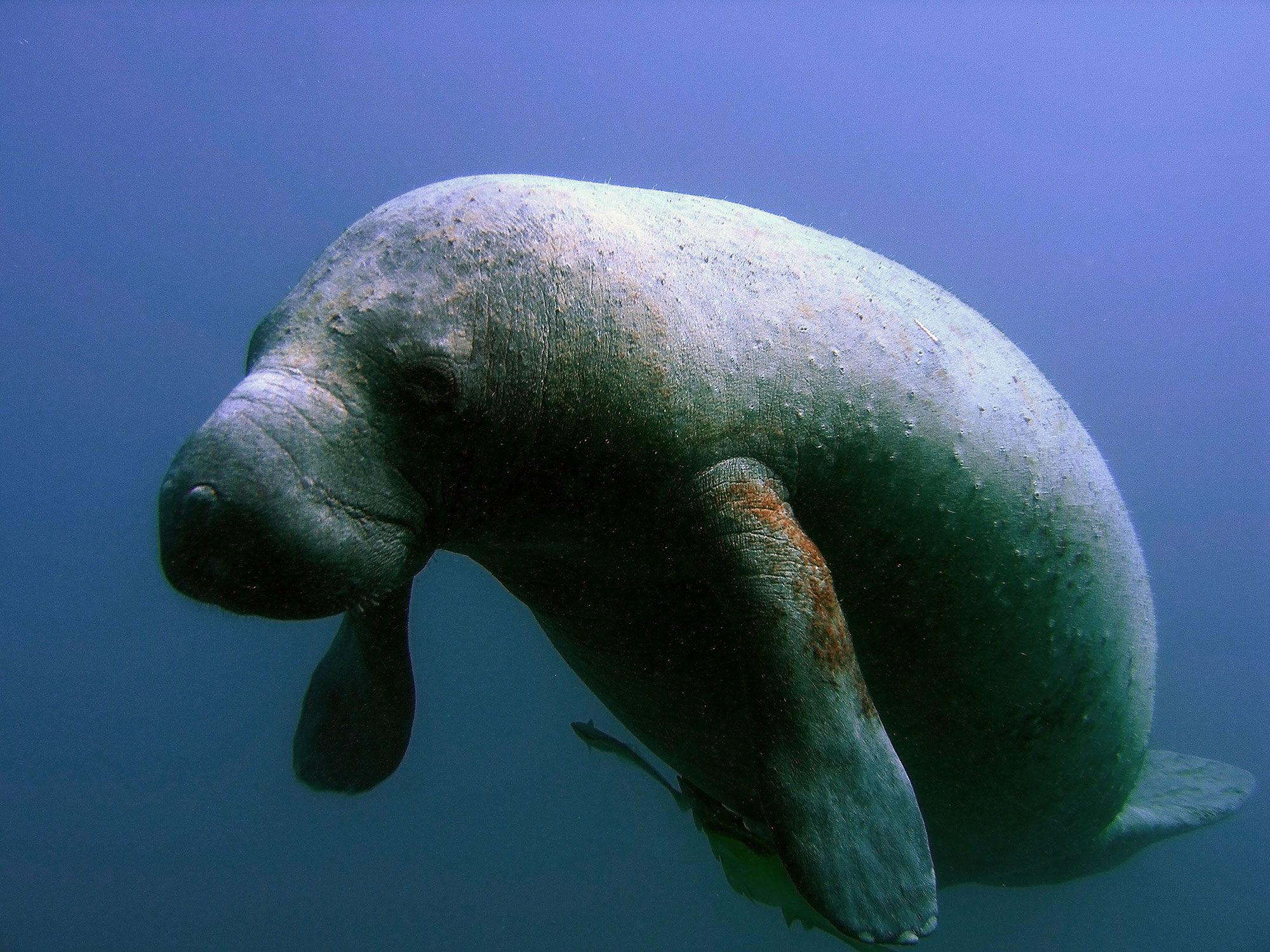 Vaca marina o manatí, Trichechus manatus. Golfo de México. NOS Image Gallery - NOAA